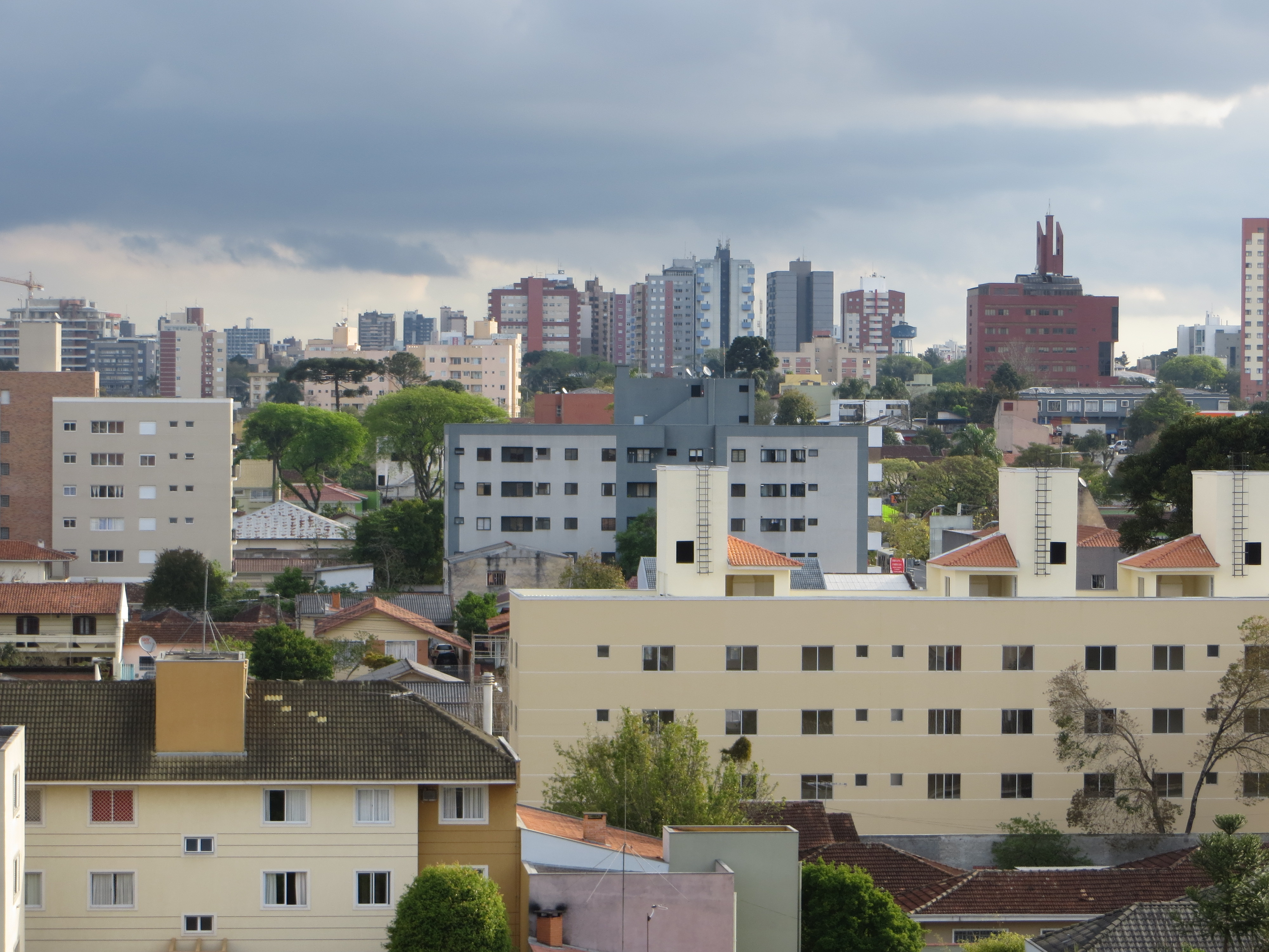 Vista parcial do Bairro Bacacheri com a zona residencial, no Município de Curitiba, Estado do Paraná, Brasil.